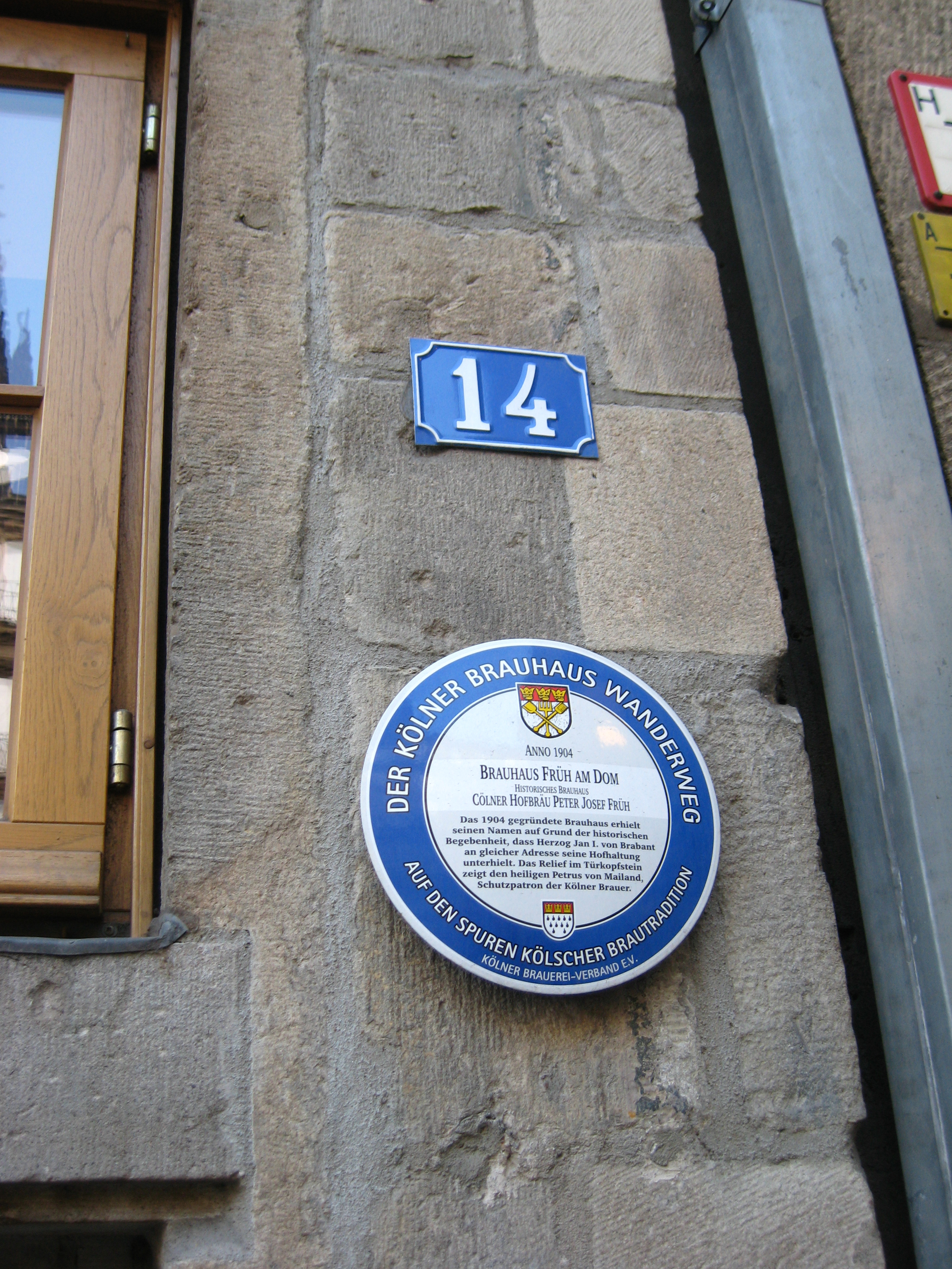 Station des Kölner Brauhauswanderwegs (hier: Brauhaus Früh am Dom) Datum: 12.02.2011 Urheber M. Pfeiffer alias Benutzer:Gordito1869 Quelle: privates Fotoarchiv des Urhebers